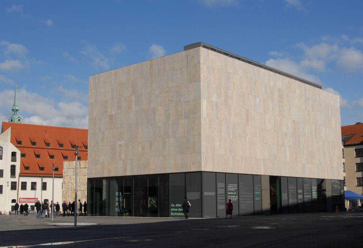 München, Jüdisches Museum